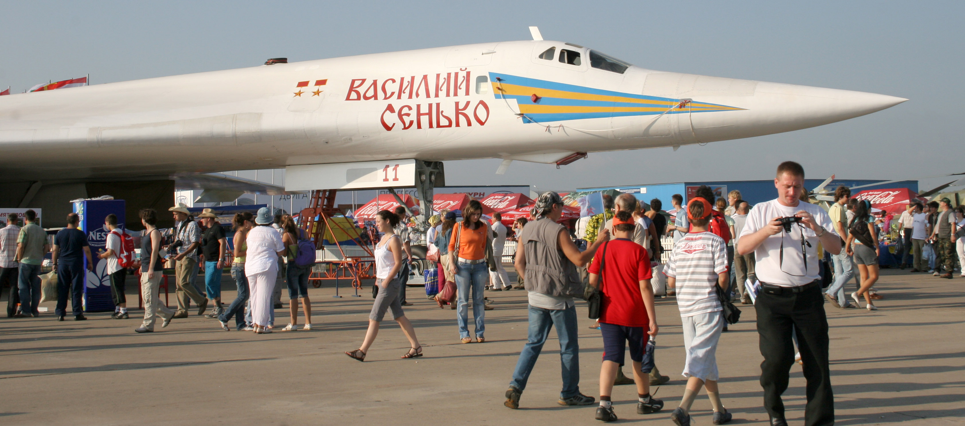 Самолёт Ту-160 "Василий Сенько". Экспозиция на МАКС-2007